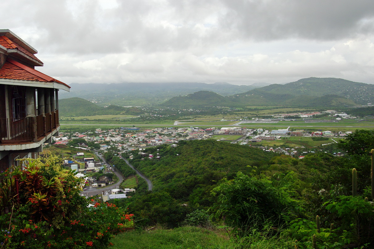 Blick auf Vieux Fort vom Aussichtspunkt bei Moule a Chique